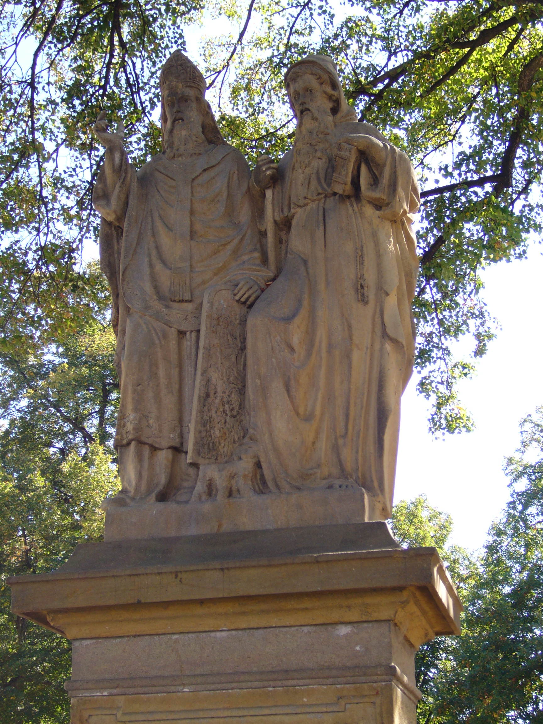 Cyril a MetodějUnknown cyril and methodius